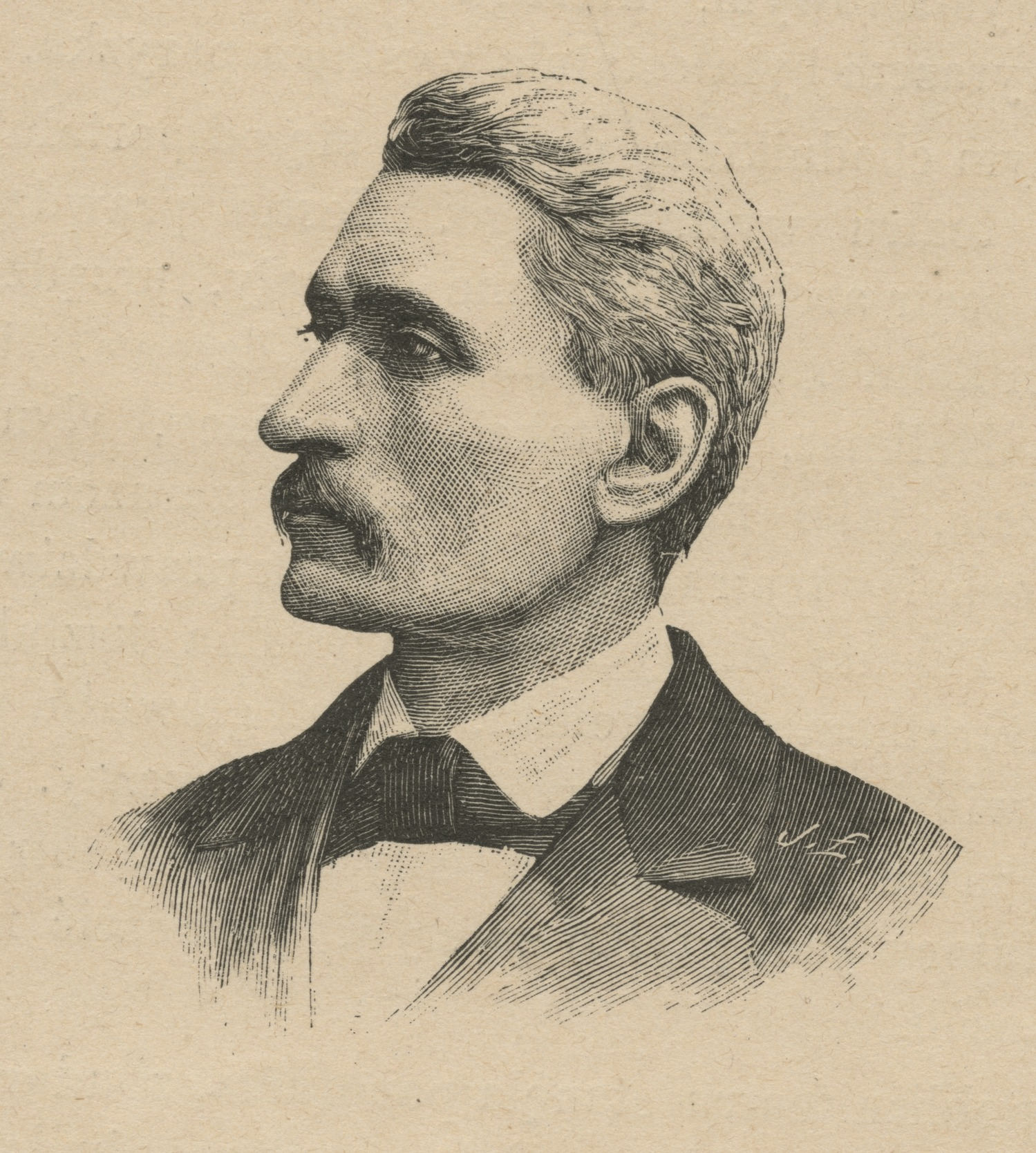 August Wrześniowski